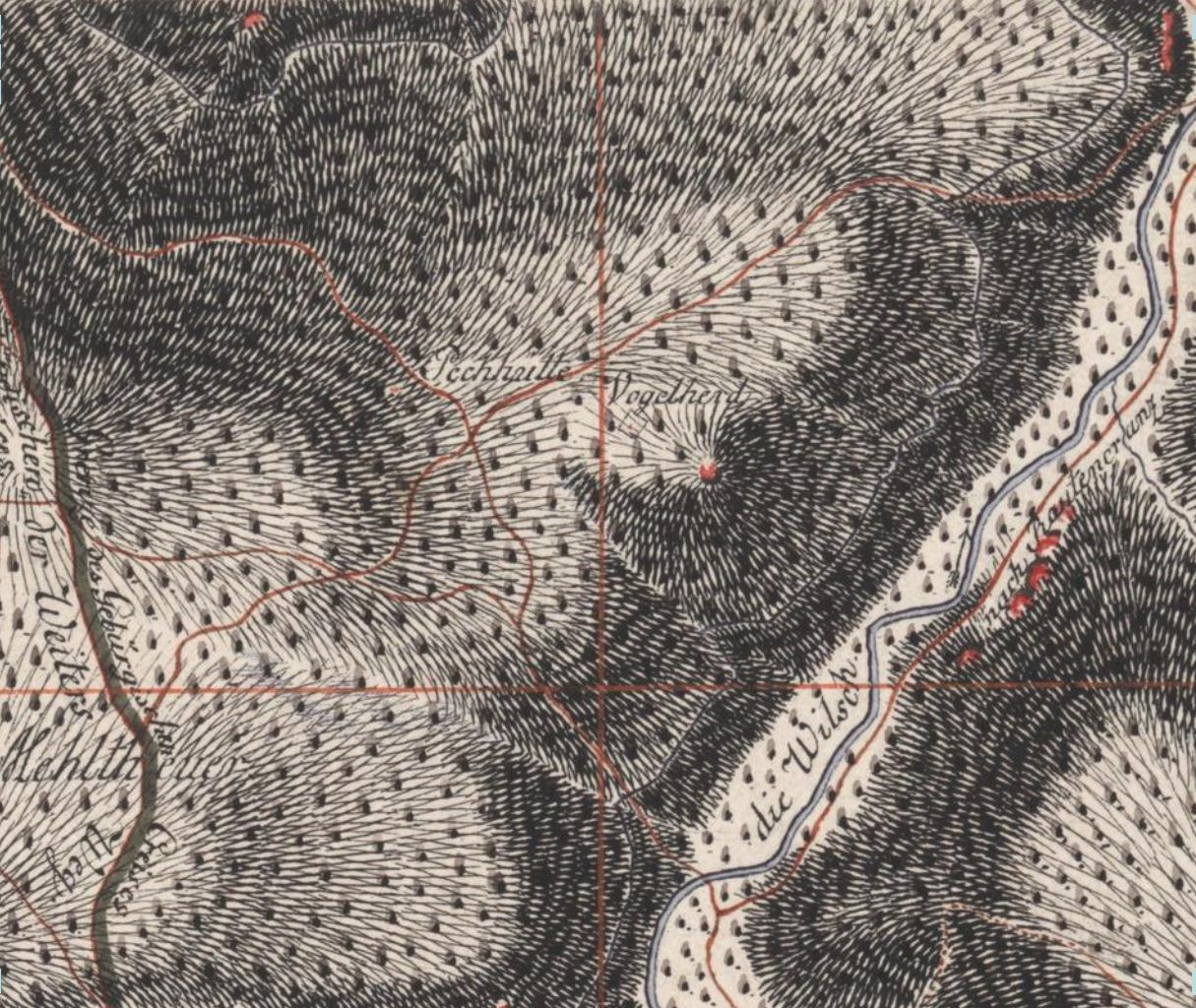 Wilzsch: Ausschnitt aus Blatt 220 der Sächsischen Meilenblätter im Berliner Exemplar von 1791. Pechhütte.Hinweis: Karte ist nicht genordet. Oben ist Nordwesten. Karte in der Staats- und Universitätsbibliothek Dresden